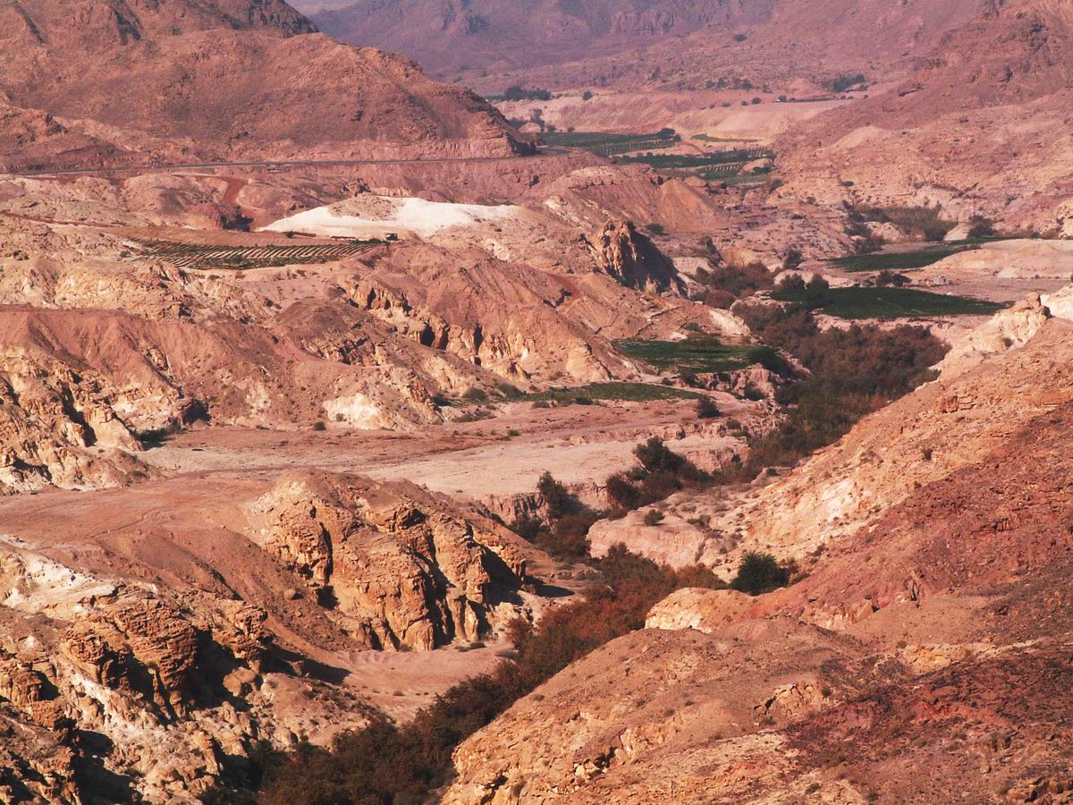 עין אל גרבנה, ירדן. נמצאת בירידה מתופל לכיוון צאפי אשר בדרום ים המלח photo by Uri Juda